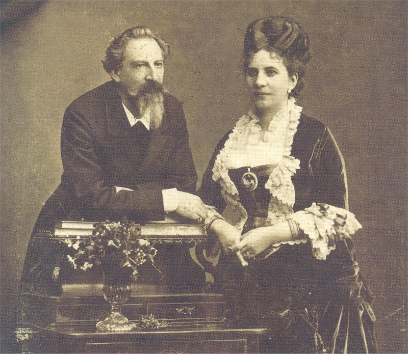 Fotografia de D. Fernando II, rei de Portugal, ao lado de sua segunda esposa, Elise Hensler.